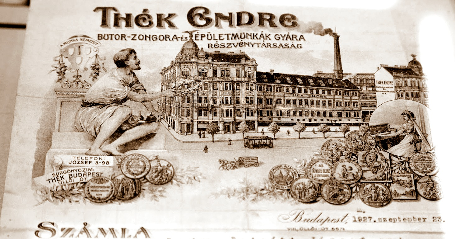 Az Üllői úti bútorgyár gyár egy számlája